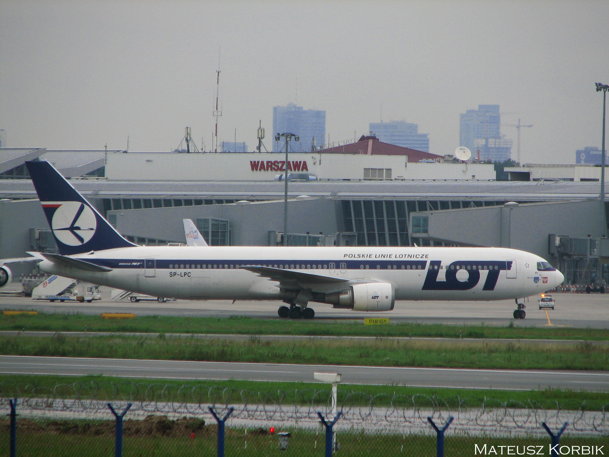 August 1st 2011